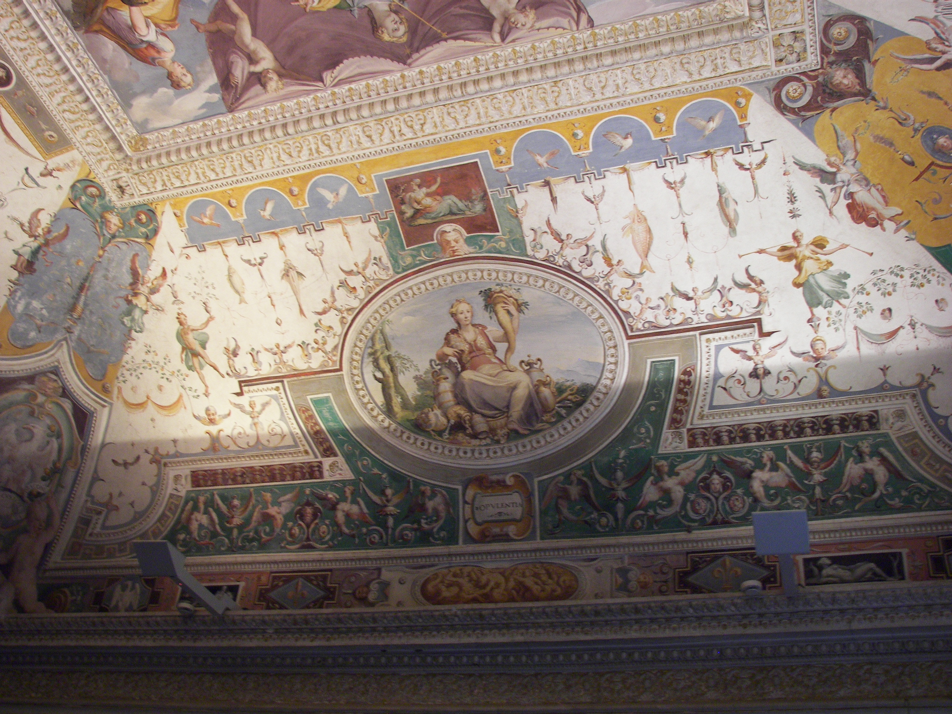 Interior of Villa d'Este in Tivoli.